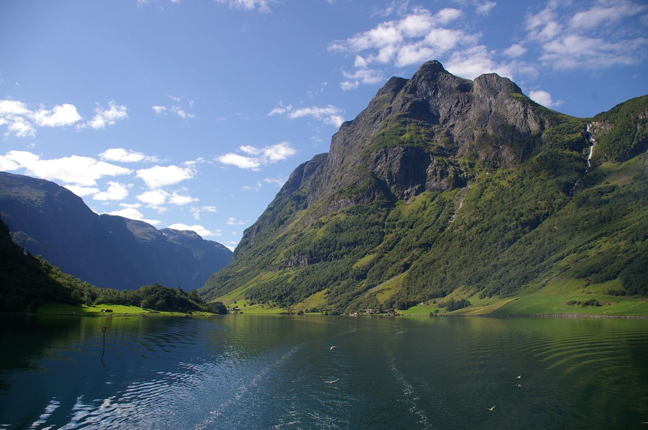 Bakkanosi (1398 moh) ved Nærøyfjorden. Største elva på høgre side av fjellet er Tufteelvi som renn ut i fjorden ved garden Tufto. Bøane på høgre side, på austsida av fjorden, er på Holmo. Ytste husa på Bakka til høgre for Holmo, so Tufto.